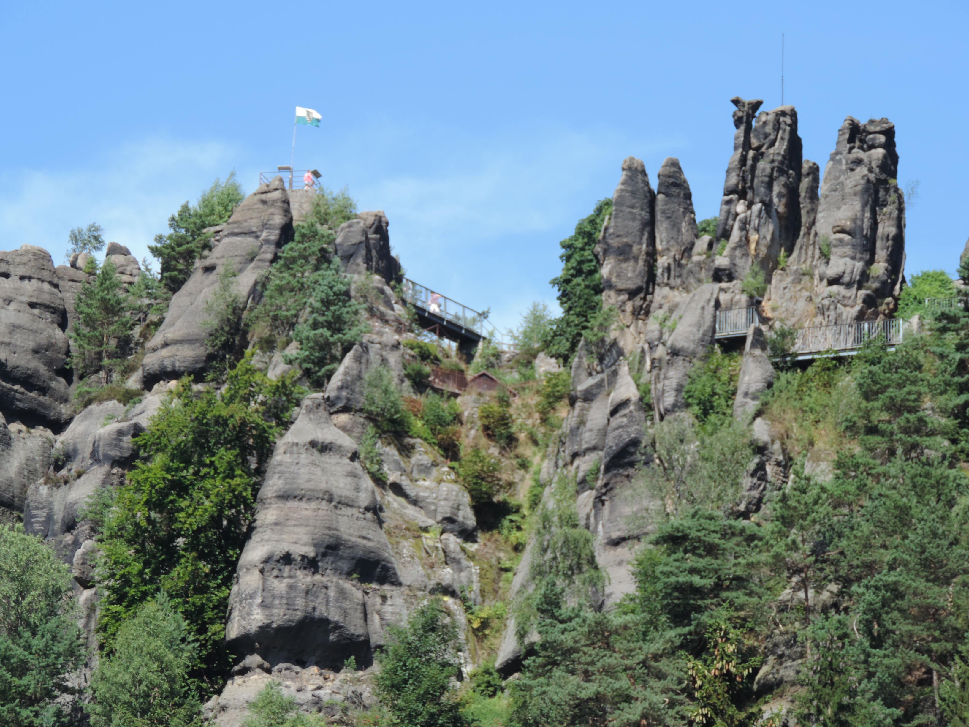 Jonsdorf - Nonnenfelsen